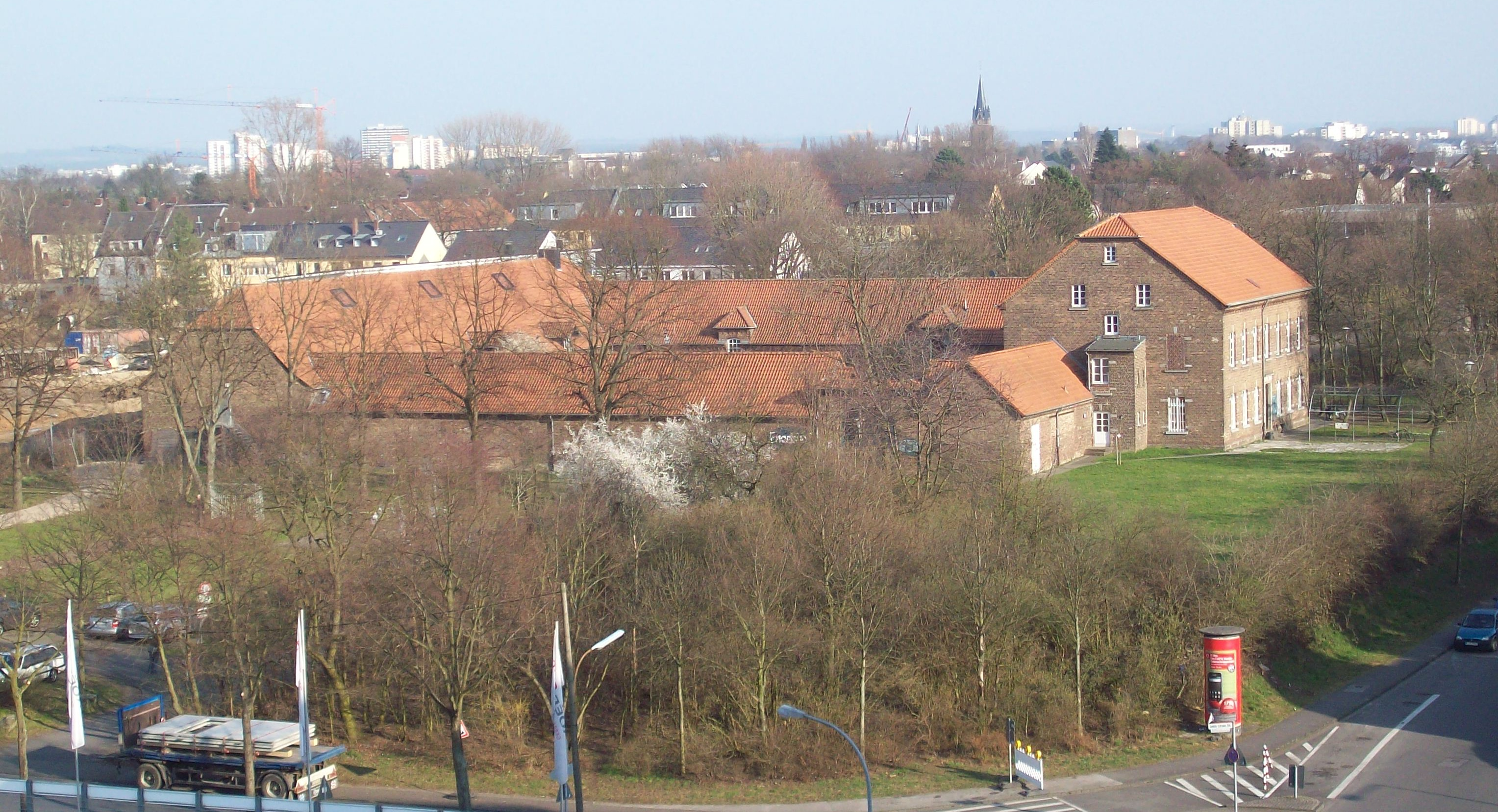 Das Bild zeigt den Engelshof in Köln-Westhoven. Das Foto ist in der Oberstr. 103 in der sechsten Etage geschossen worden und zeigt in Ost-Südöstliche Richtung. (Im Hintergrund ist Ensen die Kirche St. Laurentius zu sehen.